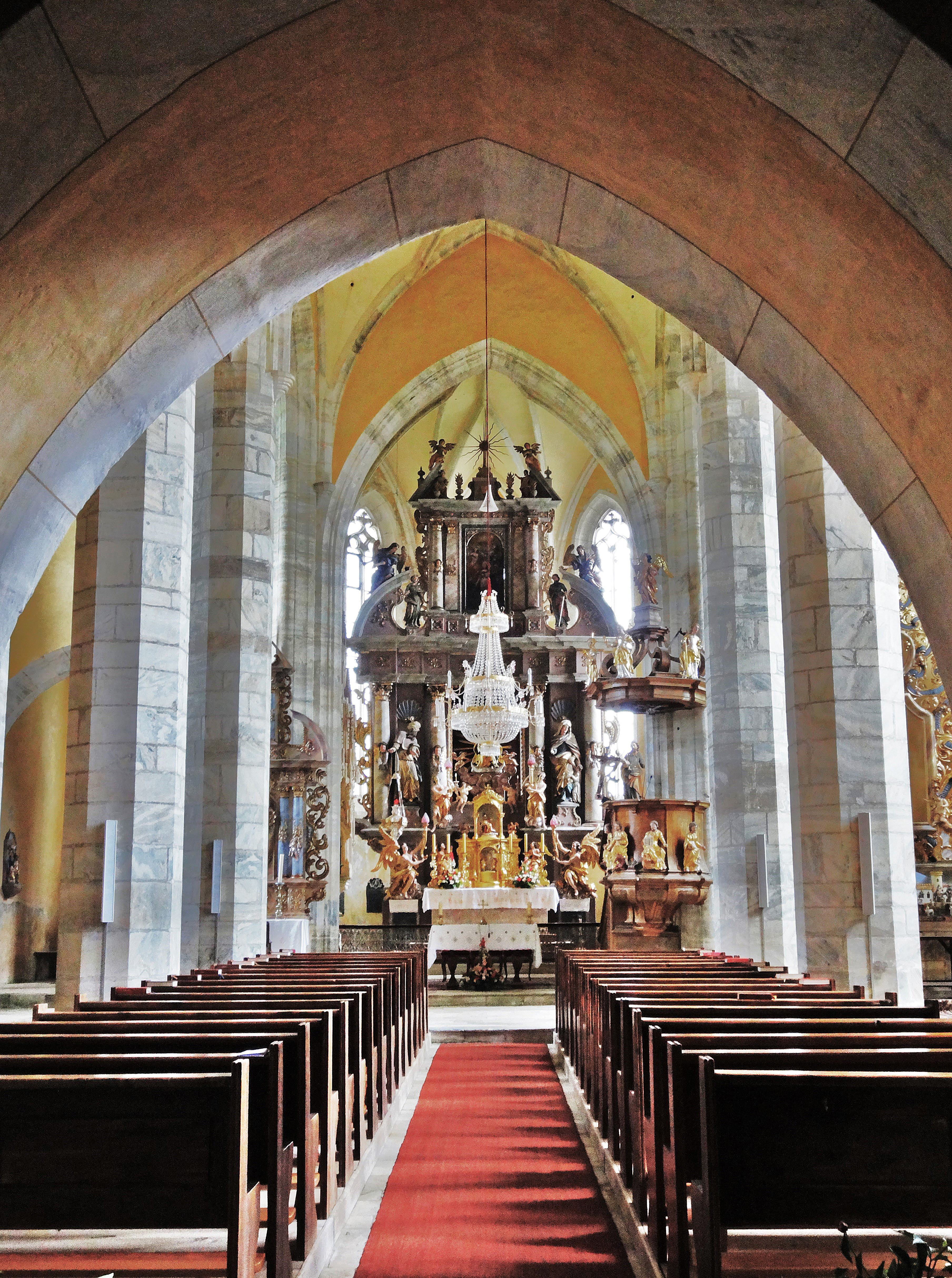 Kath. Pfarrkirche und Wallfahrtskirche Unsere Liebe Frau, Maria Waitschach, Innenansicht